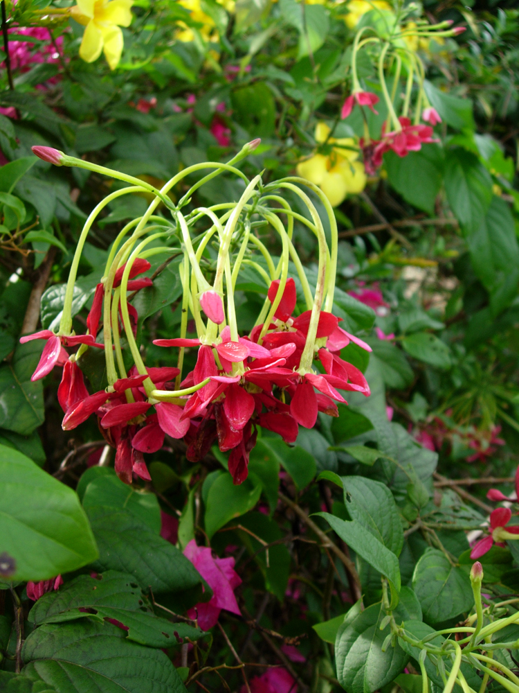 Combretum indicum